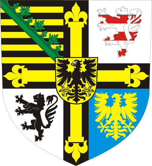 Teutonic Order - Coat of Arms of the Grandmaster Wappen des Hochmeisters des Deutschen Ordens Friedrich von Sachsen